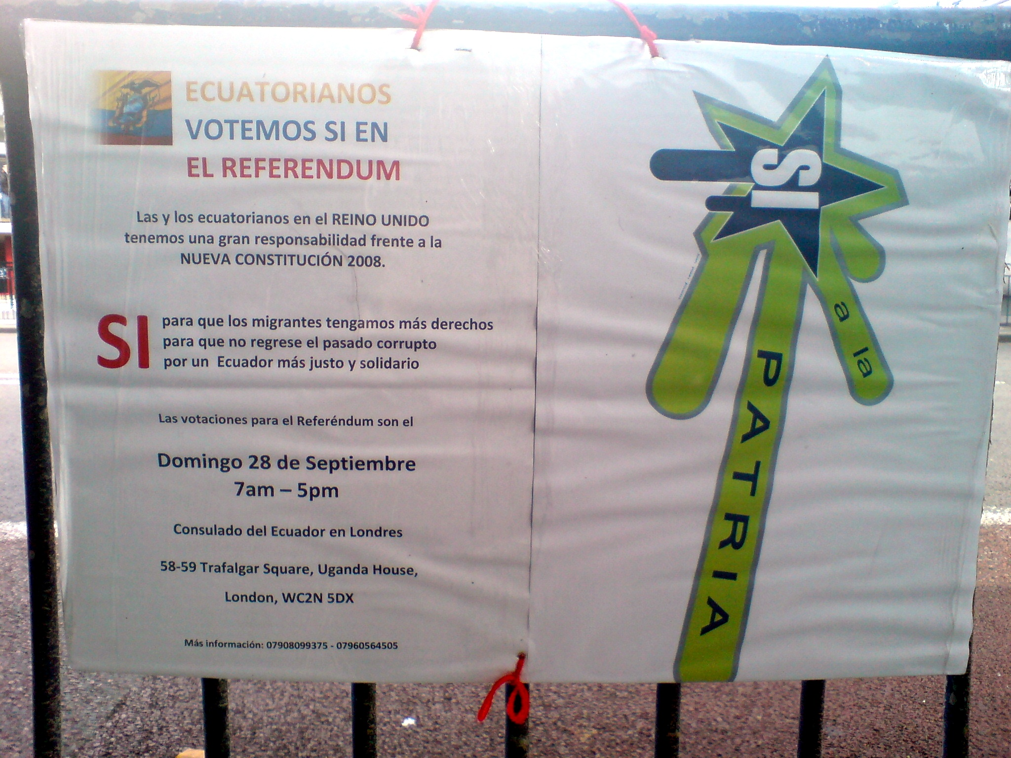 Ecadorian referendum poster. Referéndum constitucional de 2008.